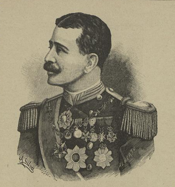 Militar e político Rafael Lopes de Andrade (1851-1900) in O Occidente n.º 778 (1900)